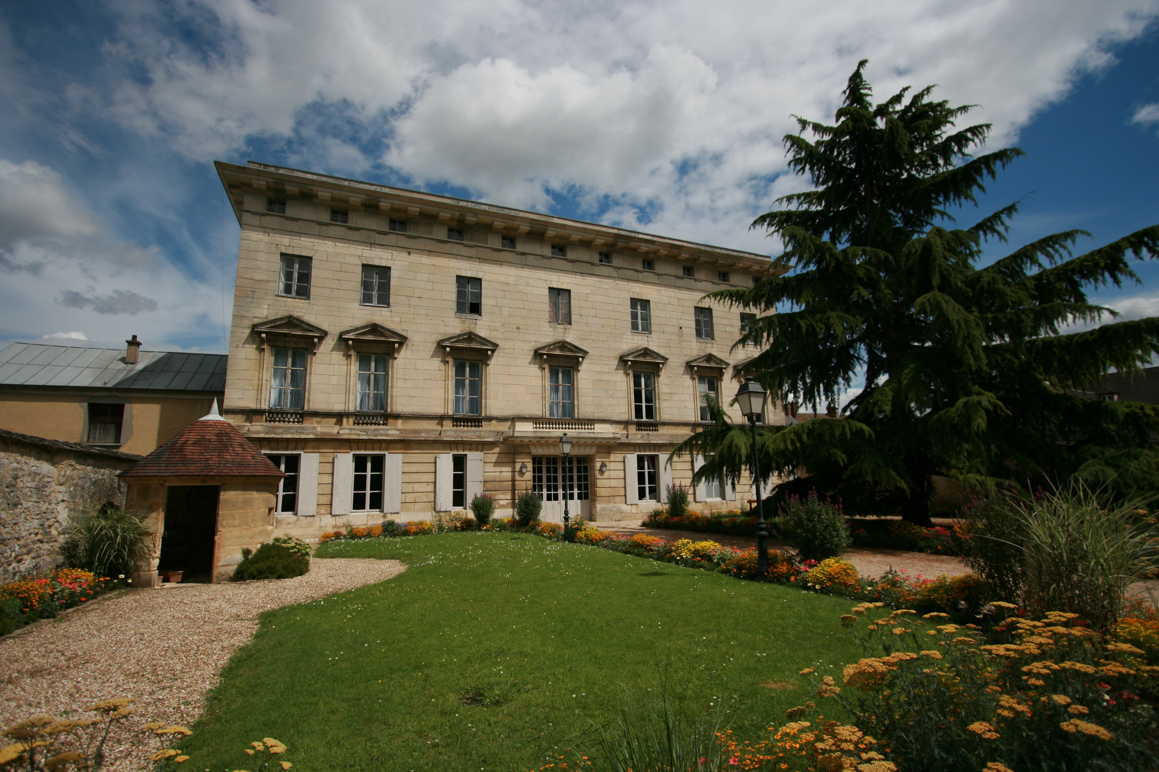 Hôtel de Crosne, jardin et façade arrière, Magny en Vexin, Val d'Oise, France